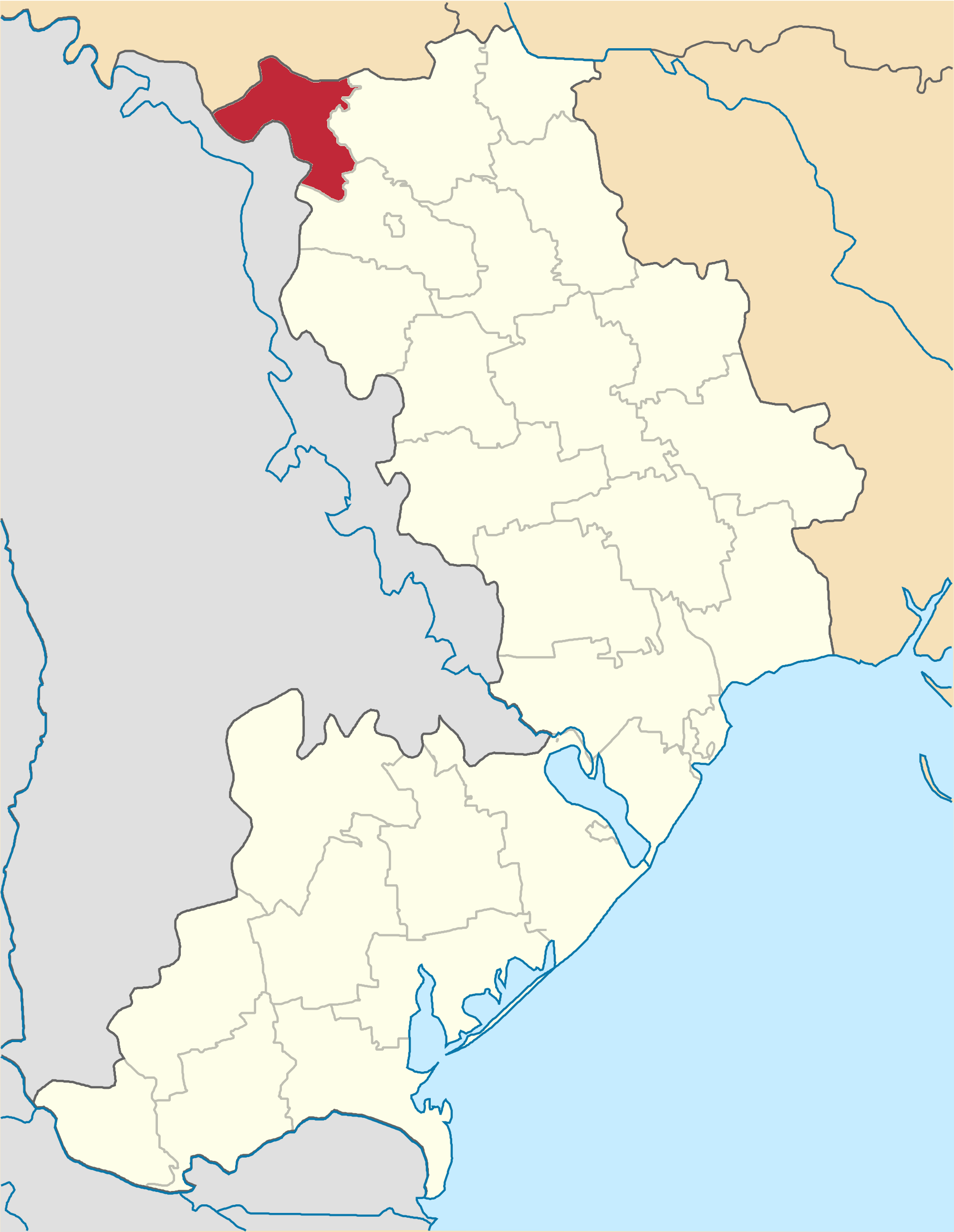 Kodymskyi-Raion map